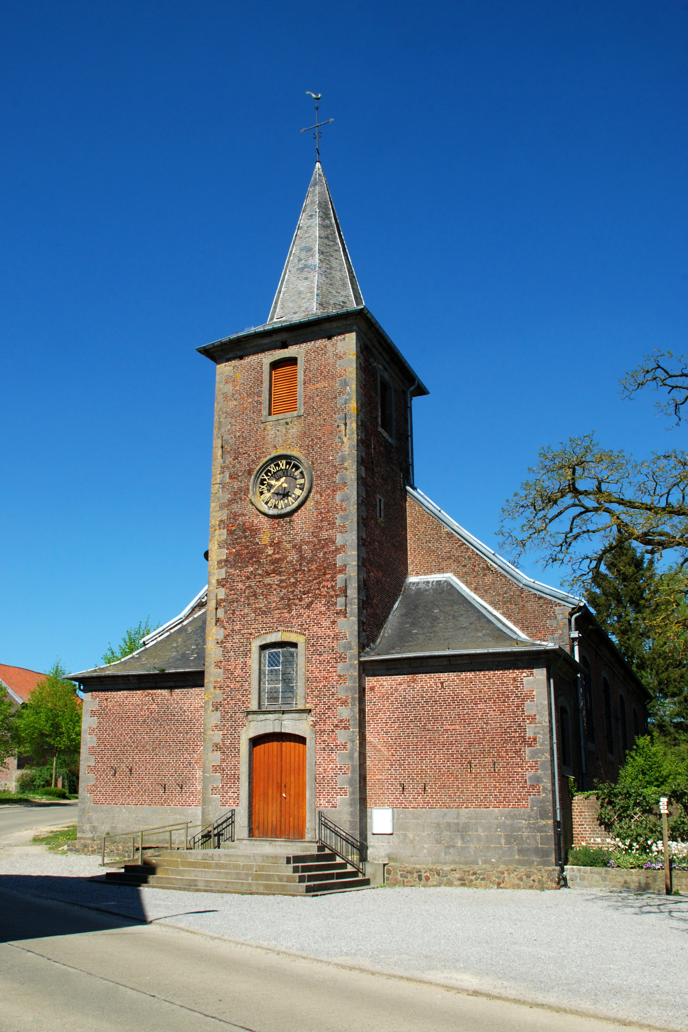 Belgique - Brabant wallon - Villers-la-Ville - Église Saint-Laurent de Mellery